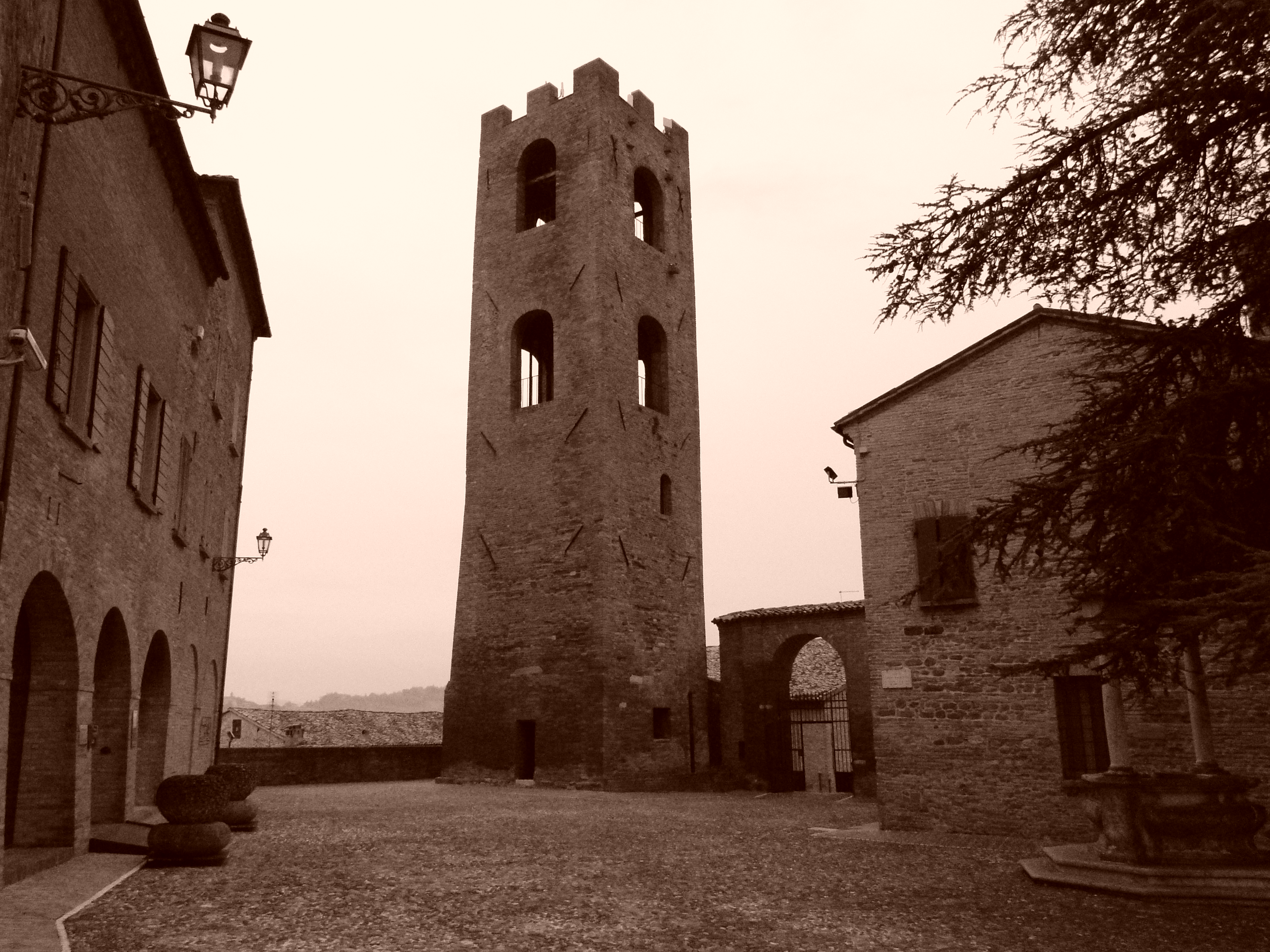 Castello Malatestiano - MIBAC This is a photo of a monument which is part of cultural heritage of Italy.